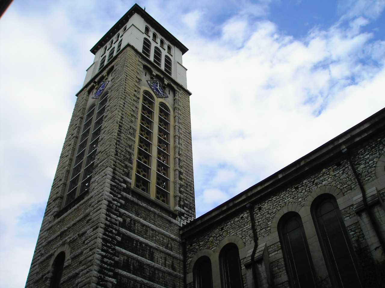 clocher de l'église Saint Joseph - Grenoble